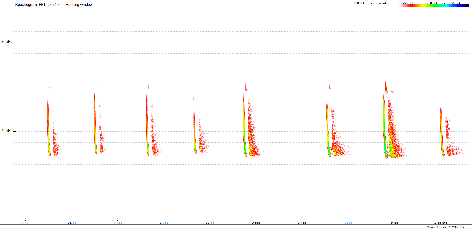 Põhja-nahkhiire sonar